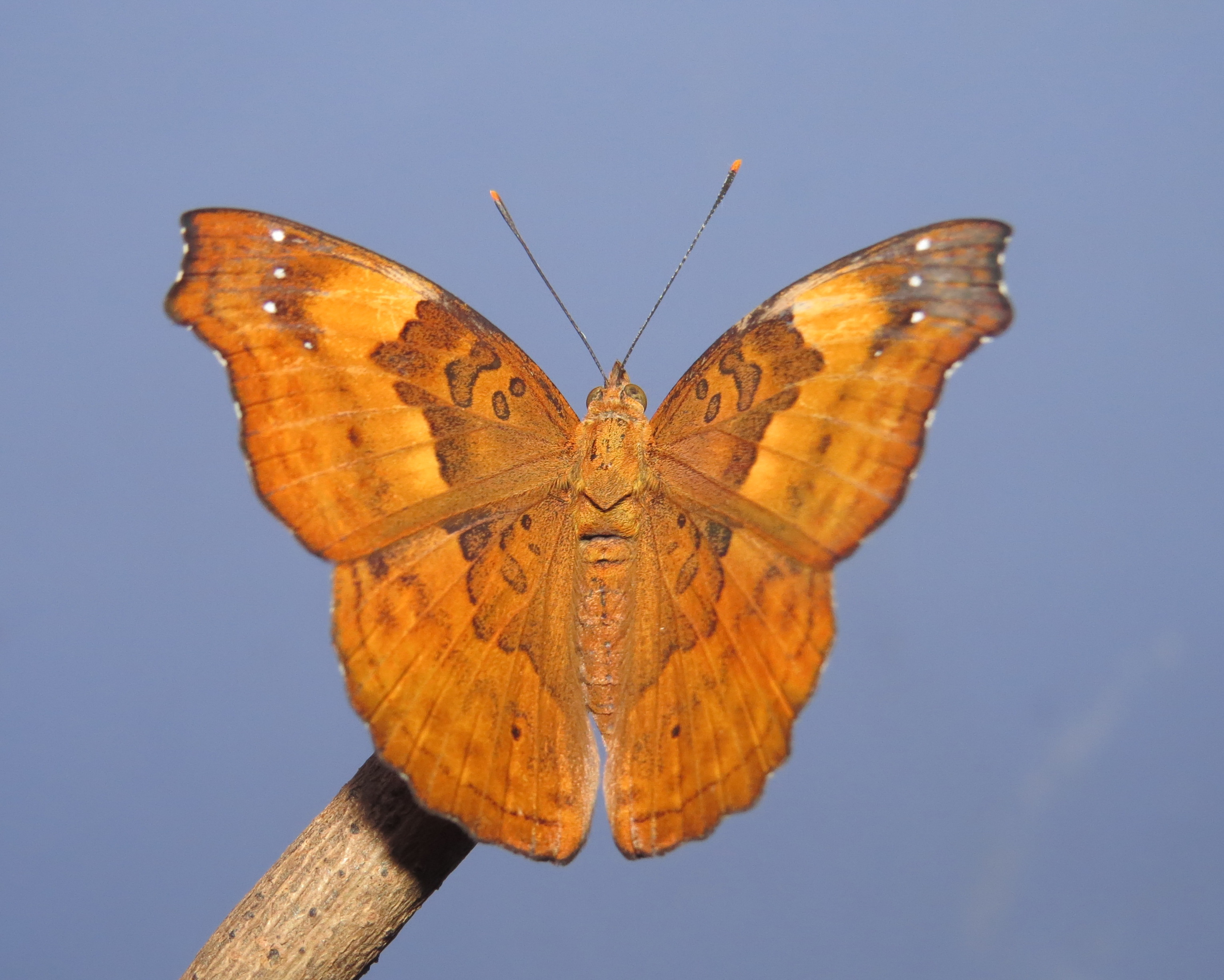 Rohana parisatis Westwood, 1850 – Black Prince at Periya, Wayanad